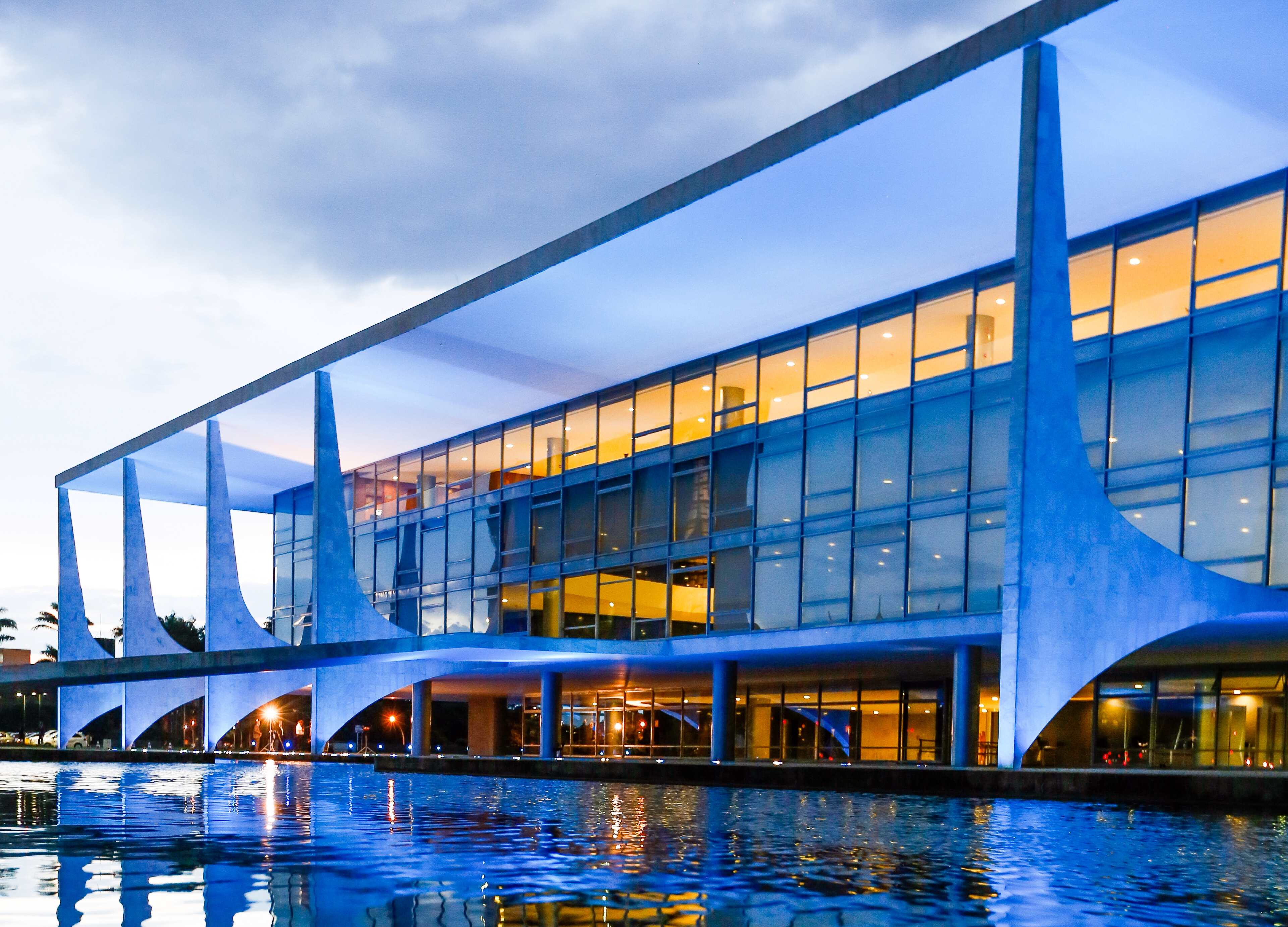 06-11-2014 Novembro Azul Foto: Anderson Riedel